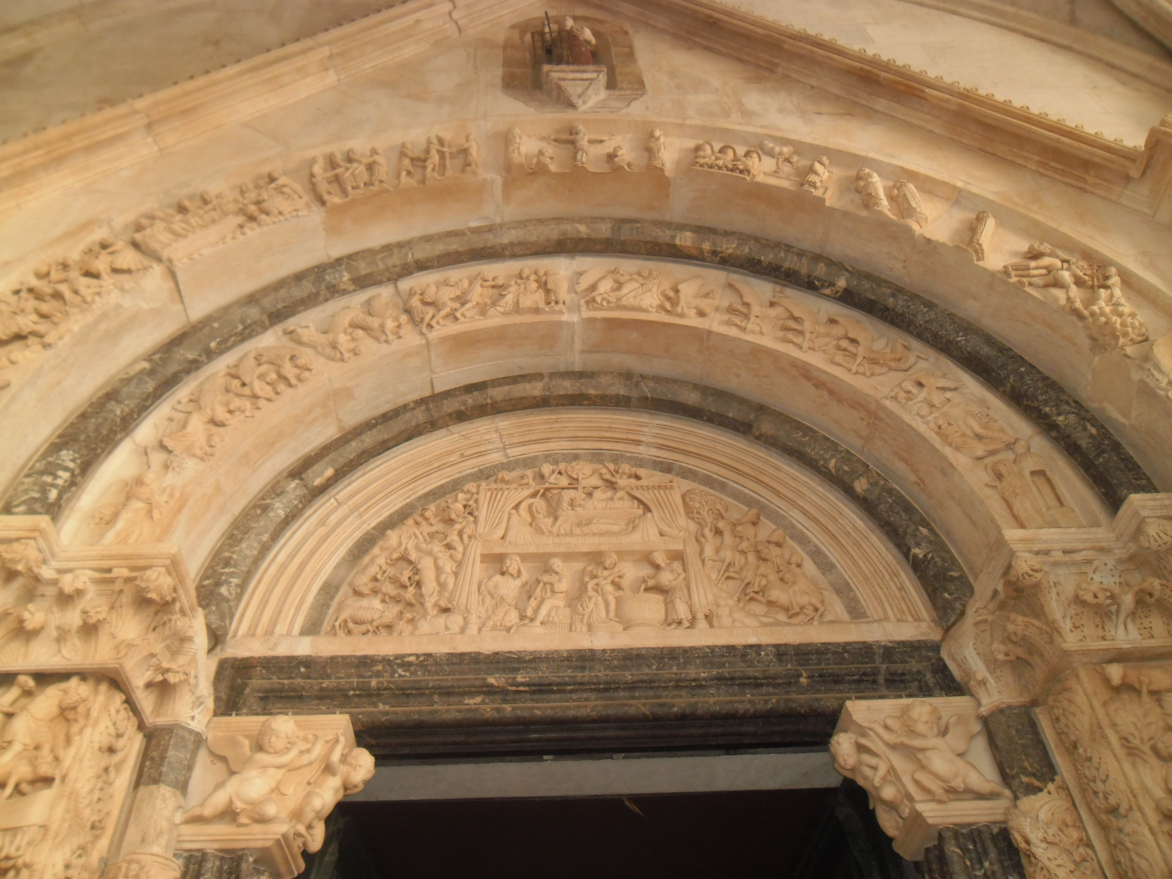 Trogir